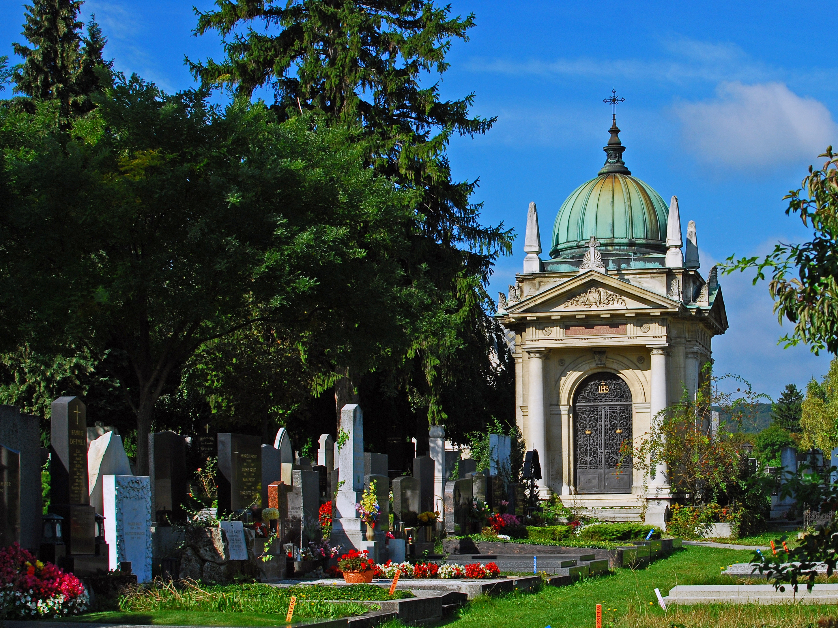 Friedhof Mauer, Blick auf die Gräber, im Hintergrund die Grabkapelle von Knips und Krassl